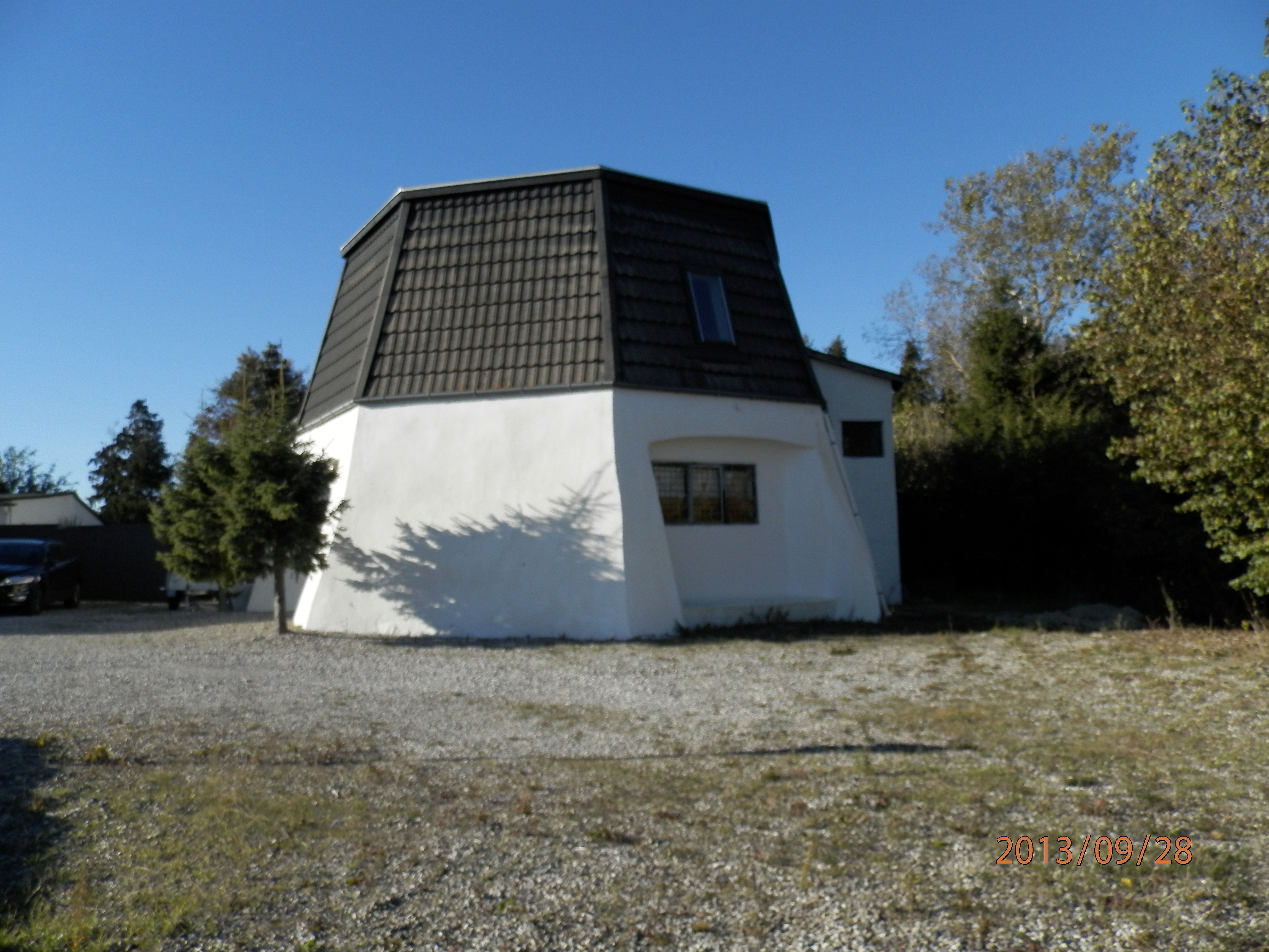 Nedlagt mølle ved Værebro Å, Jyllinge